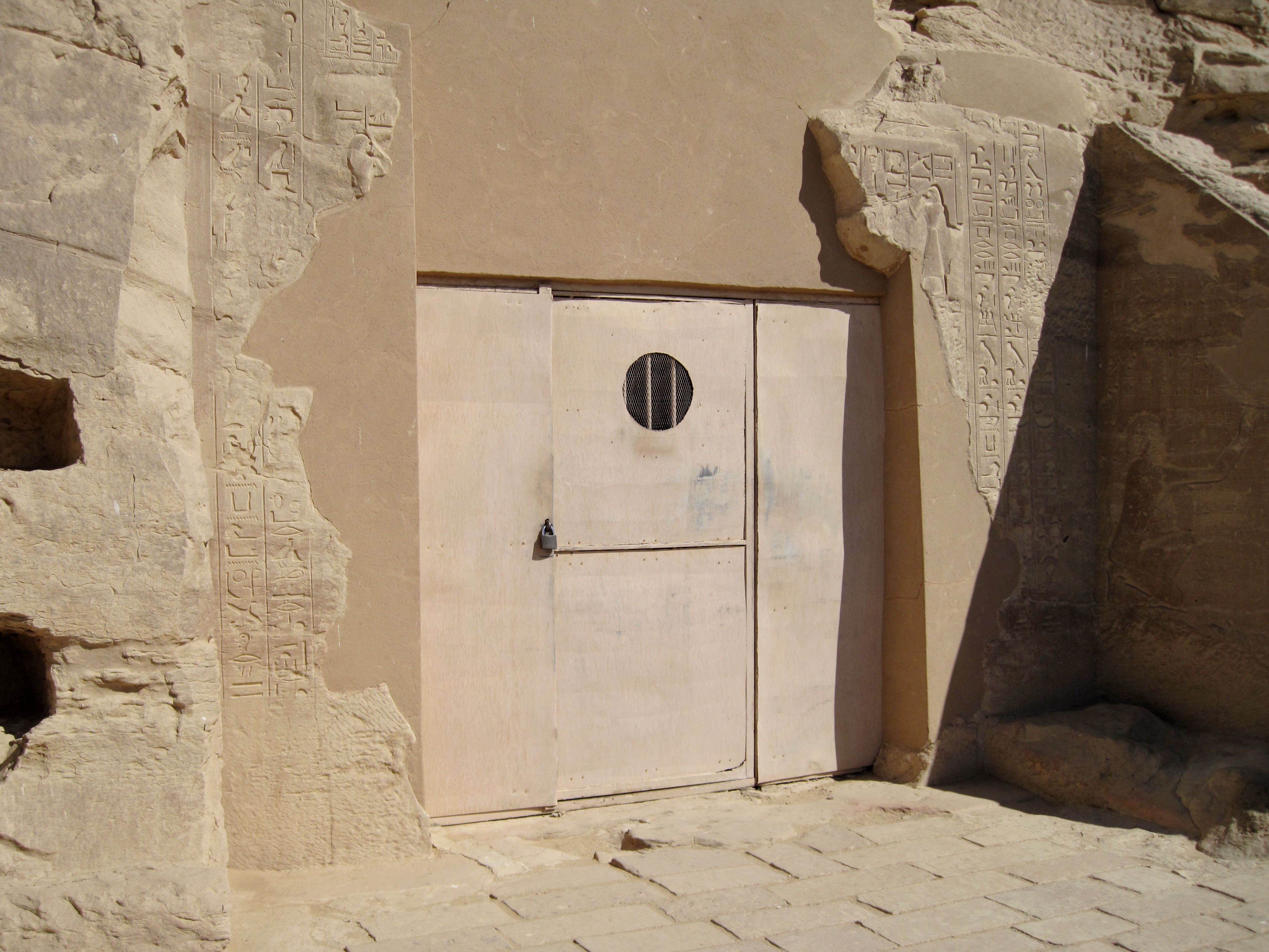 Eingang zum Felsengrab des Paheri unter den Felsengräbern des altägyptischen Necheb bei el-Kab, Ägypten